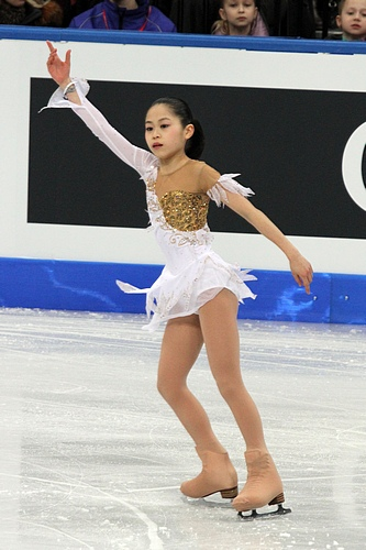 Сатоко Мияхара (Япония) на чемпионате мира по фигурному катанию среди юниоров 2012